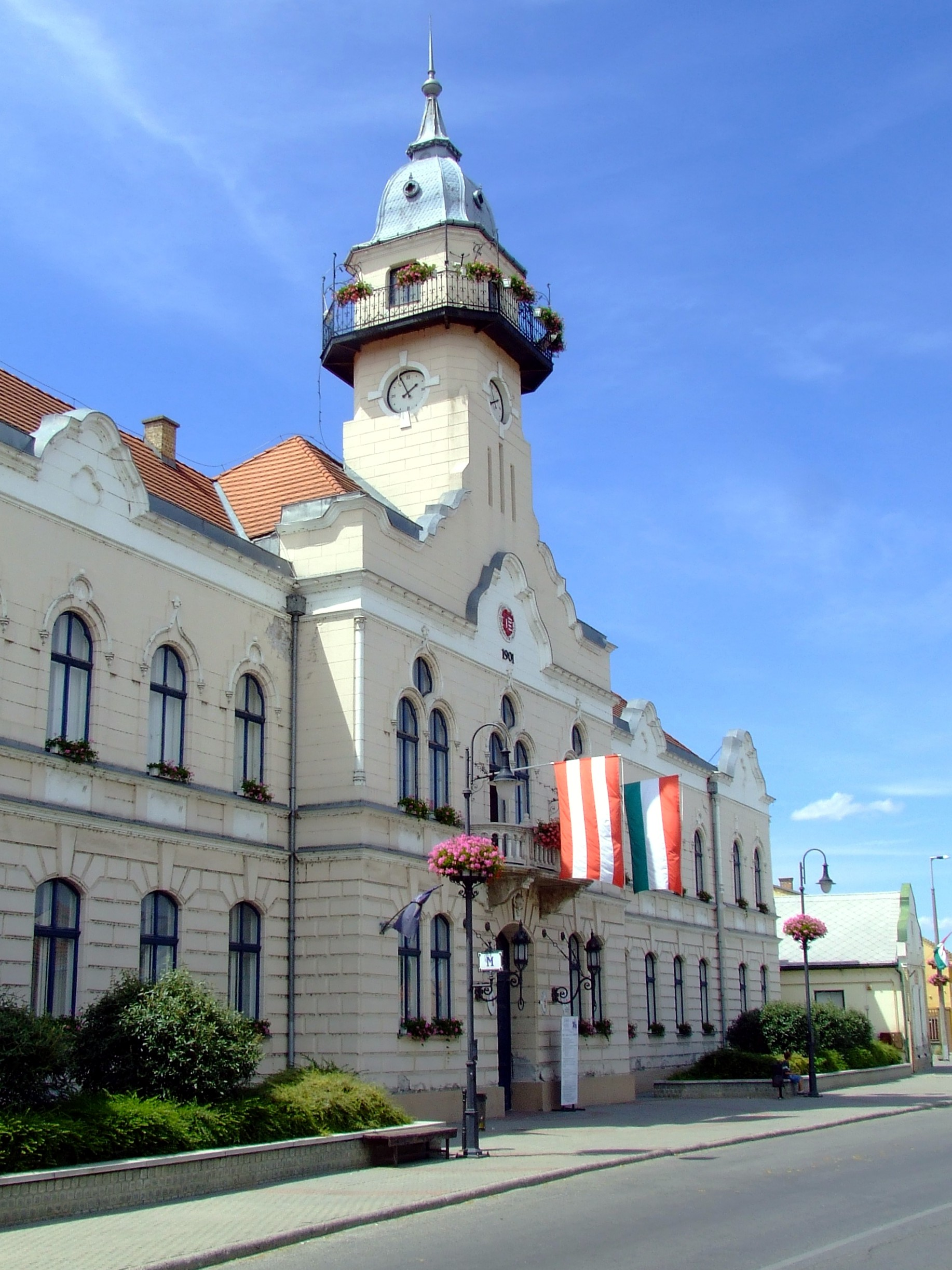 A ráckevei városháza